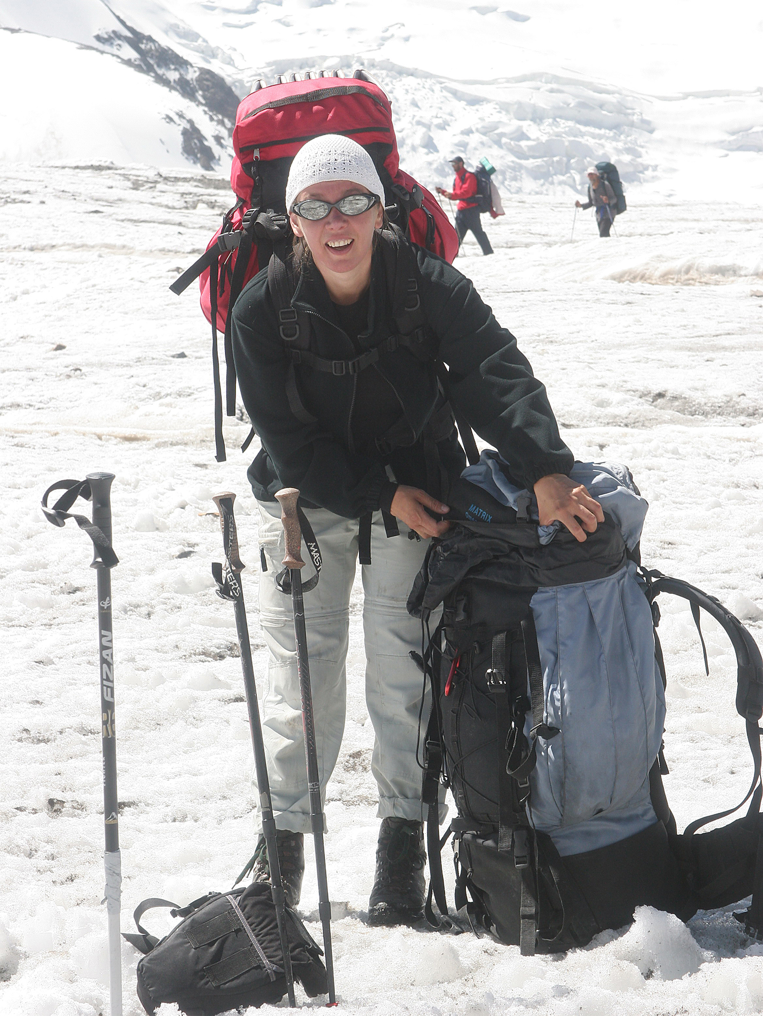 Pille Saluvere.